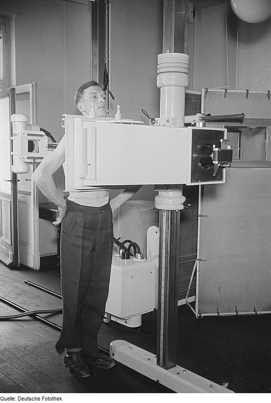 Original image description from the Deutsche Fotothek Patient während des Röntgens der Lunge